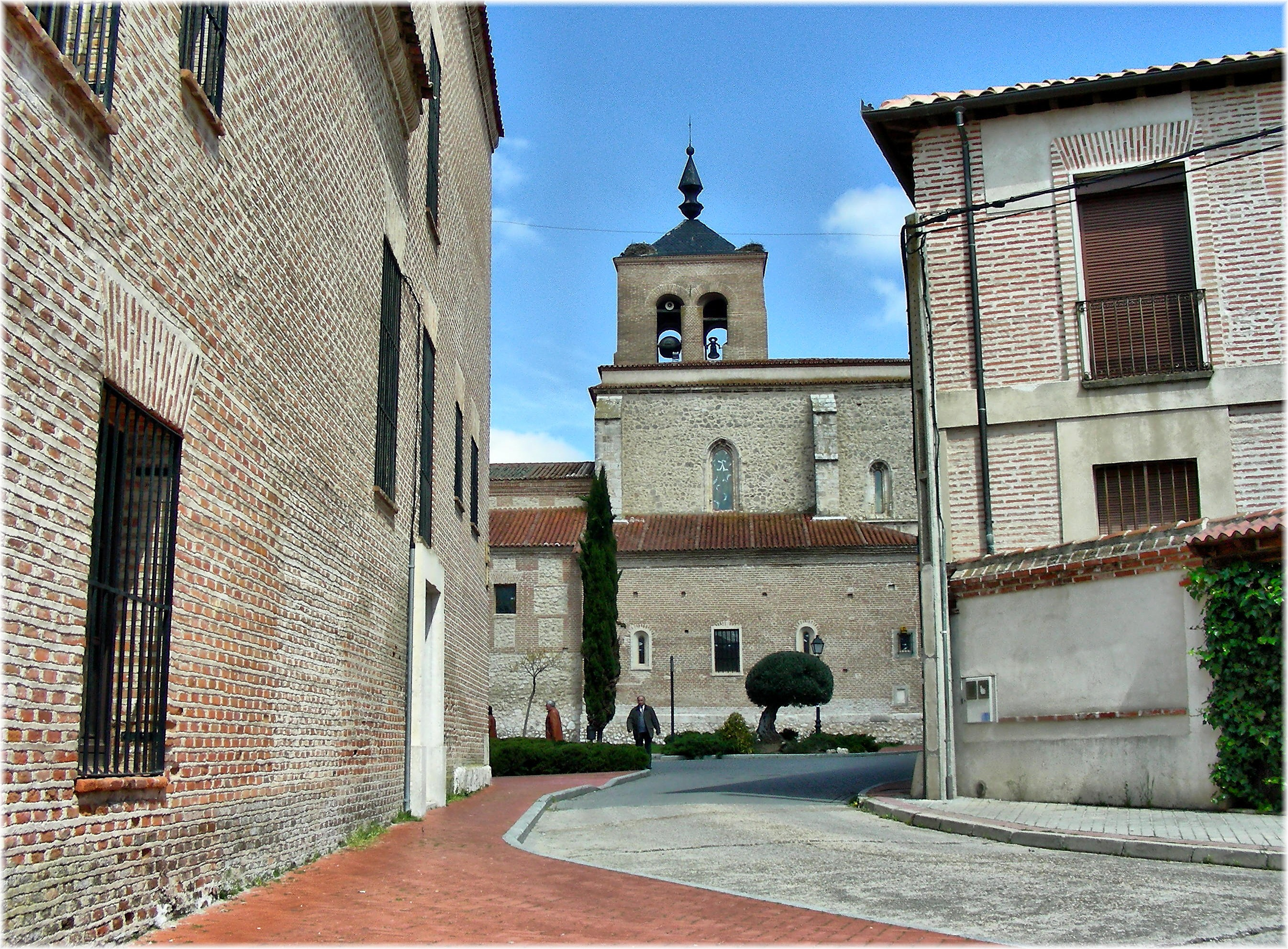 Calle de Olmedo, Valladolid.